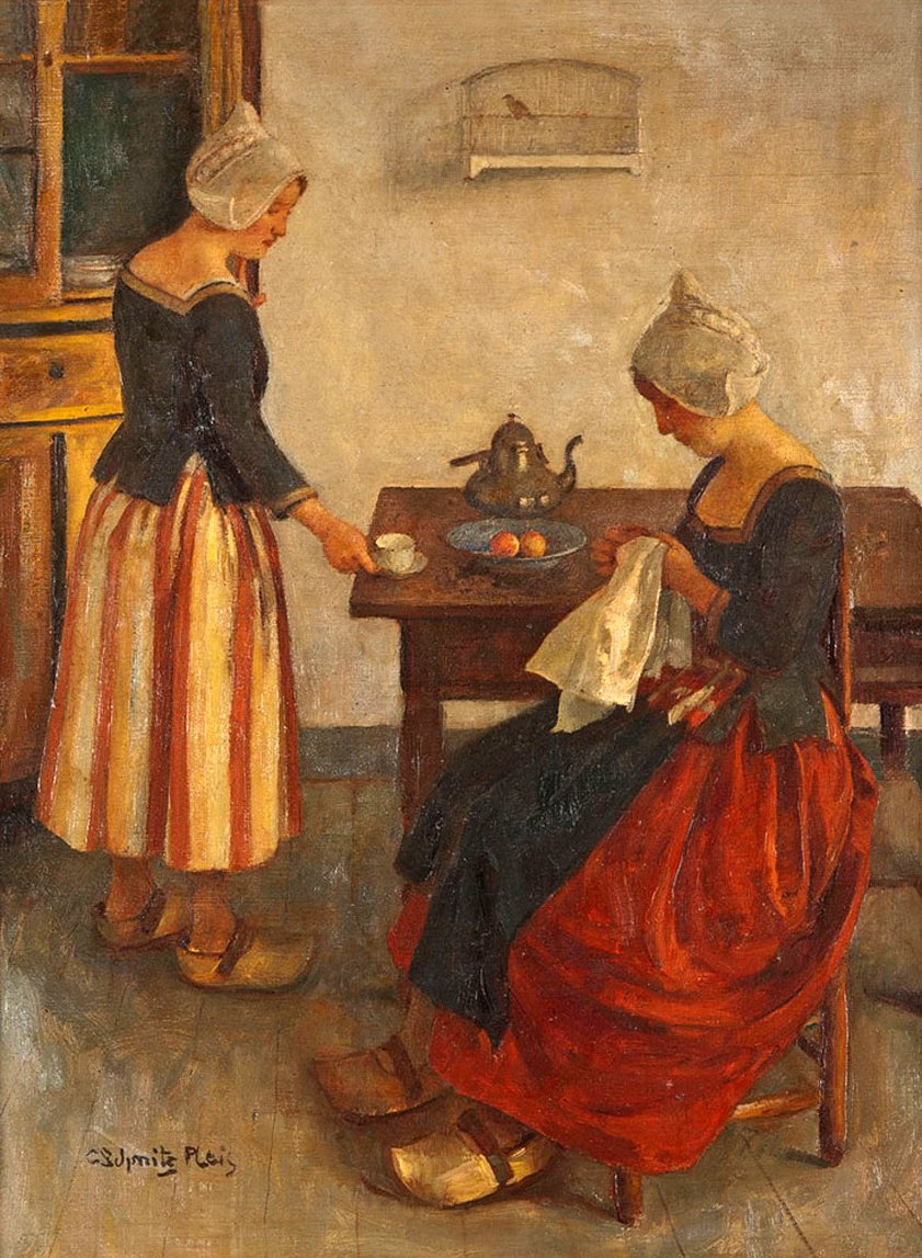 Genreszene